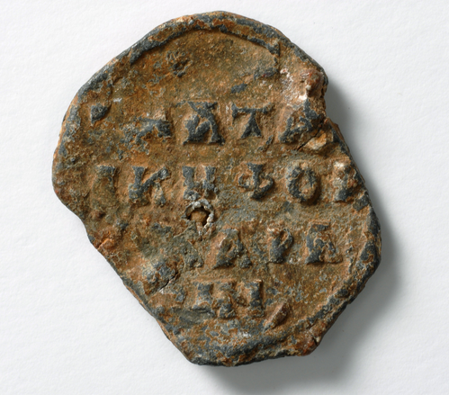 Texte grec : ...λάτρι τῷ Νικηφόρῳ Καραντήνῳ ([Seigneur, aide ton] serviteur, Nicéphore Karantènos) Collection Harvard Art Museums/Arthur M. Sackler Museum, Bequest of Thomas Whittemore.